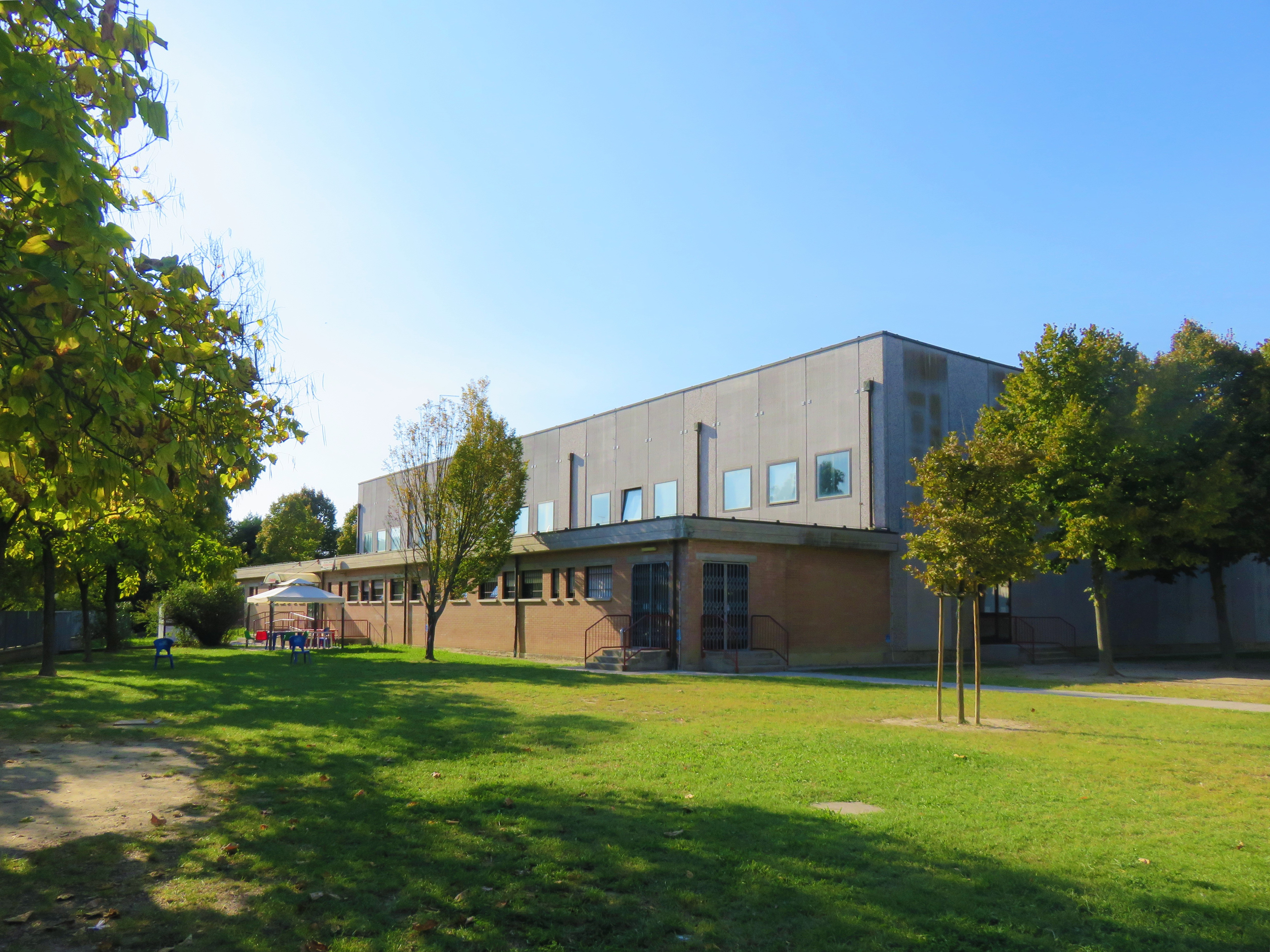 Palaboschetto, esterno. Lato sud-est